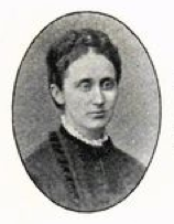 Nanna Börjesson i Svenskt porträttgalleri.